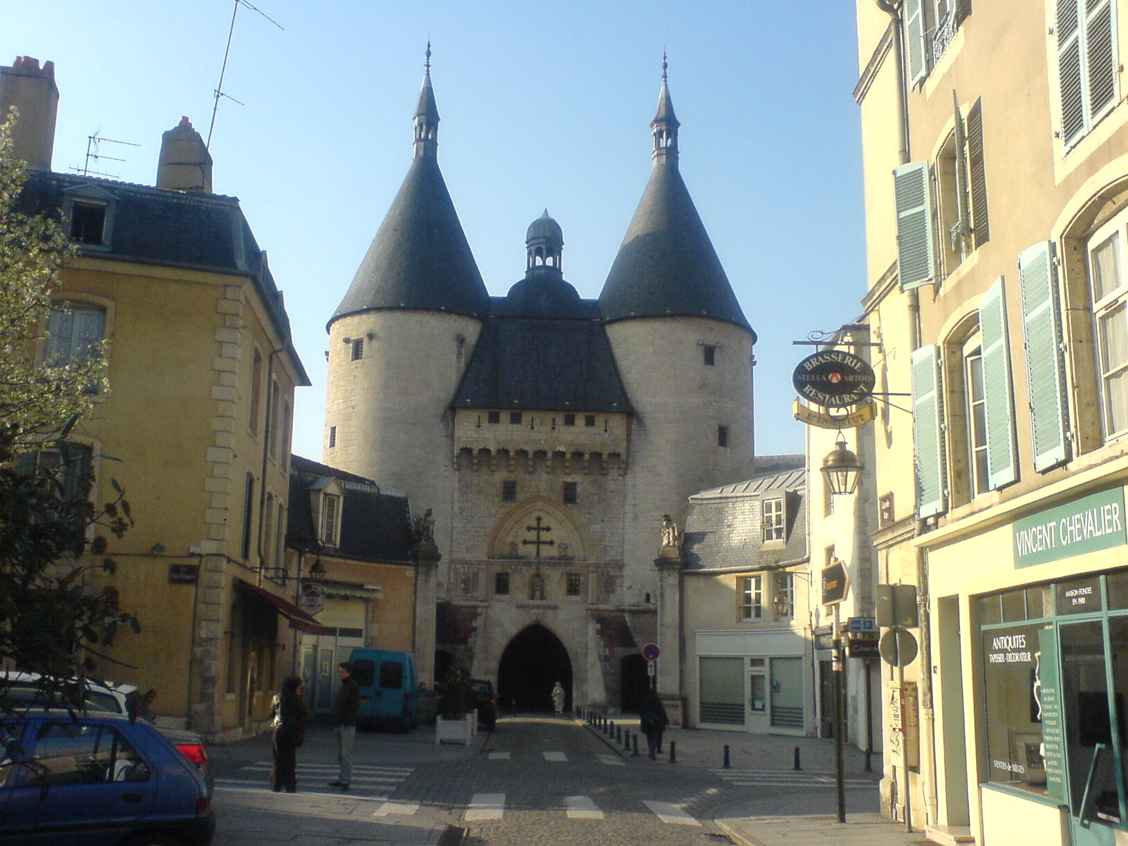 Puerta